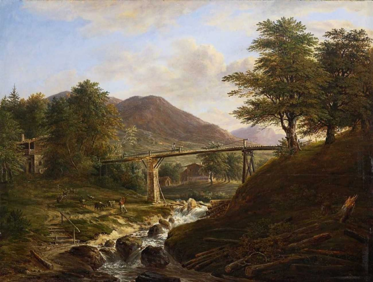 "Gegend im Albach bey Tegernsee in Altbaiern" Öl auf Holz. 46 x 60,4 cm